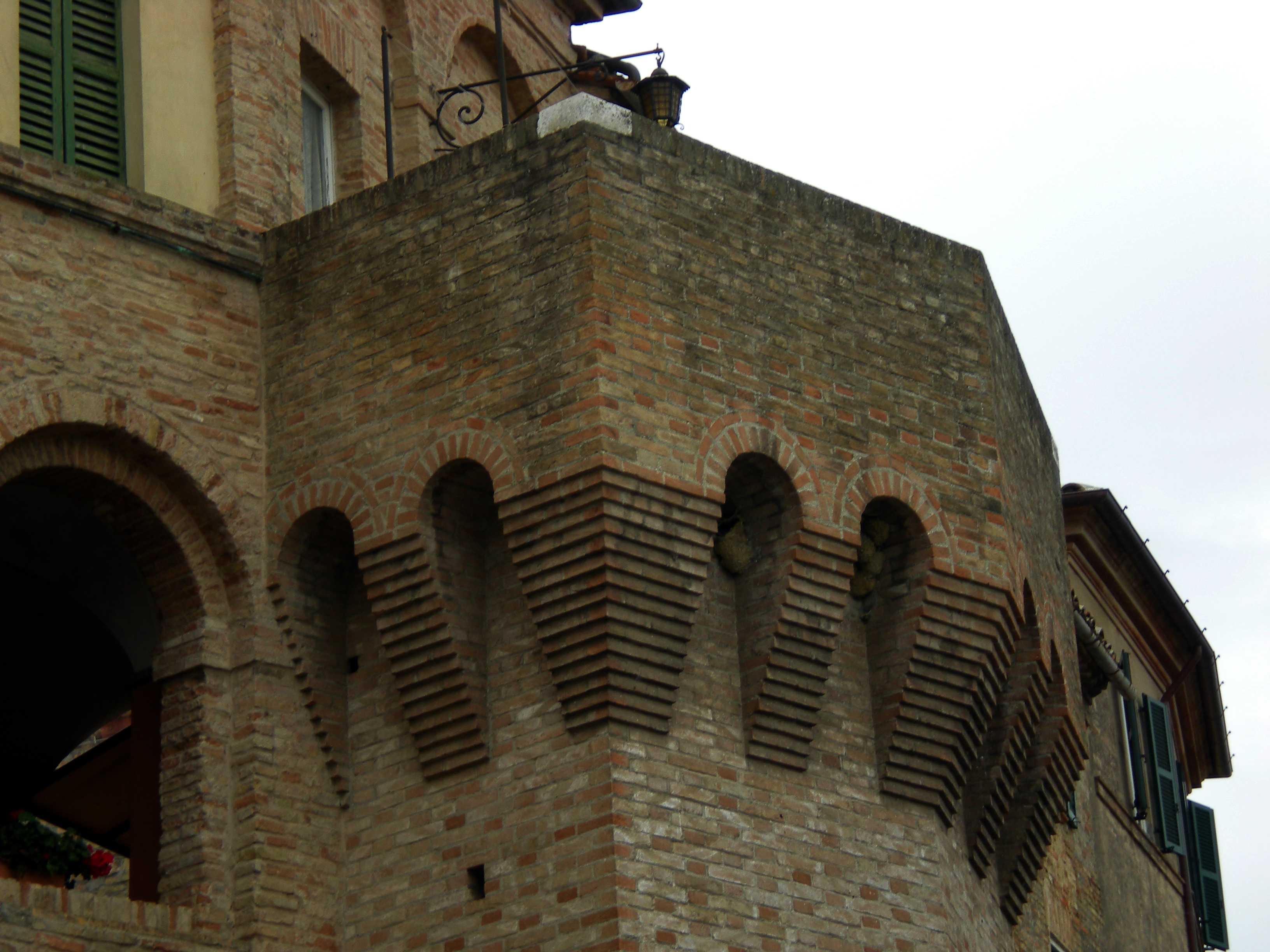 Dettaglio di un torrione lato orientale delle mura castellane di Montecarotto.